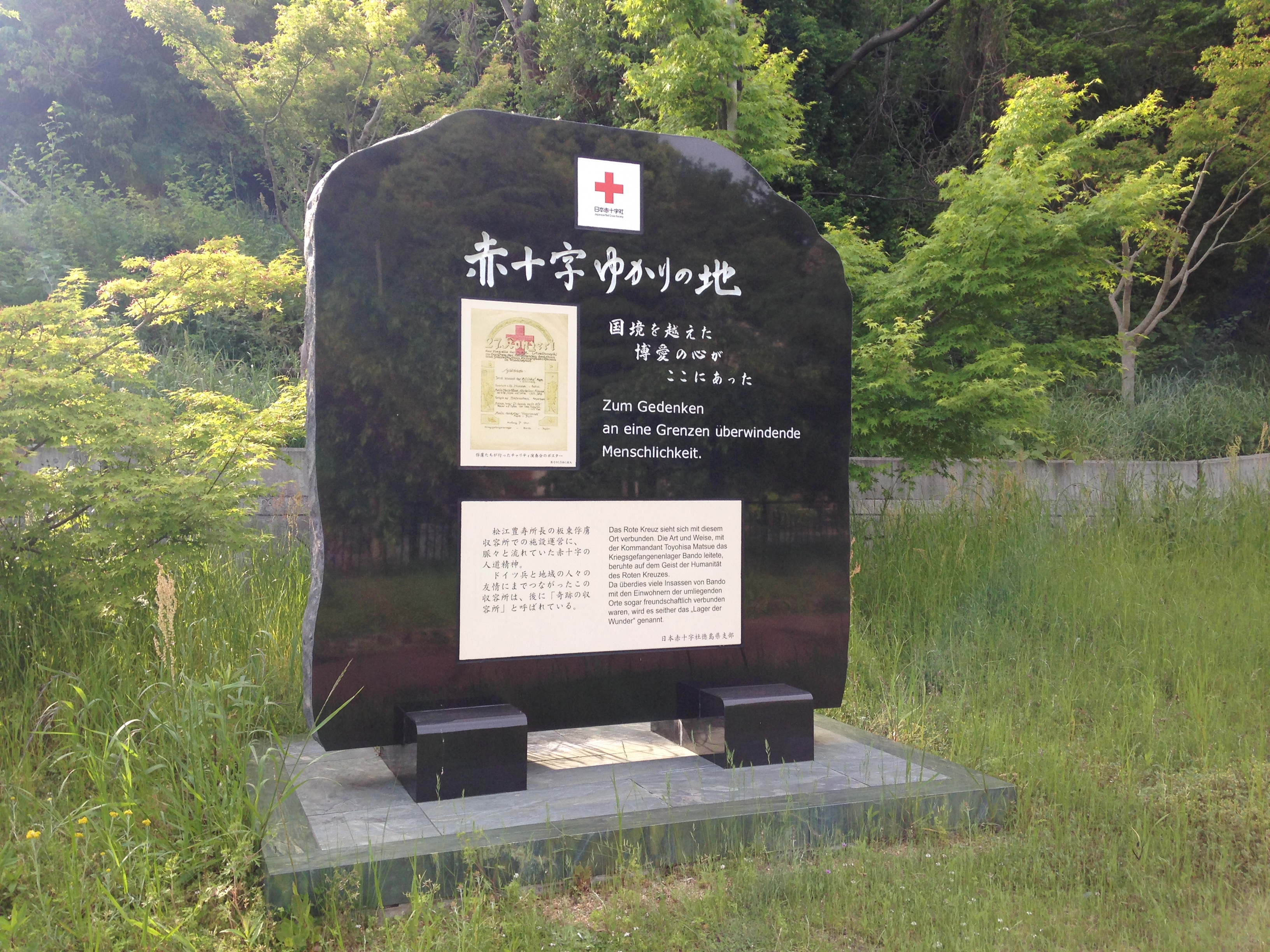 ドイツ村公園にある「赤十字ゆかりの地」記念碑